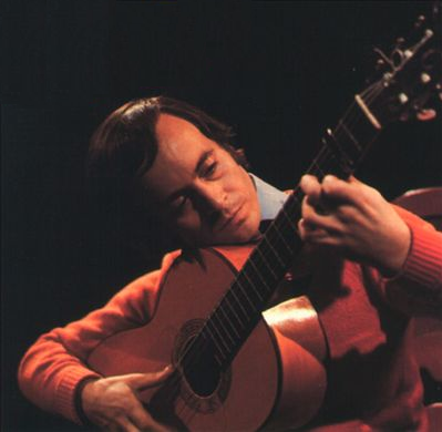 Cd paco pena